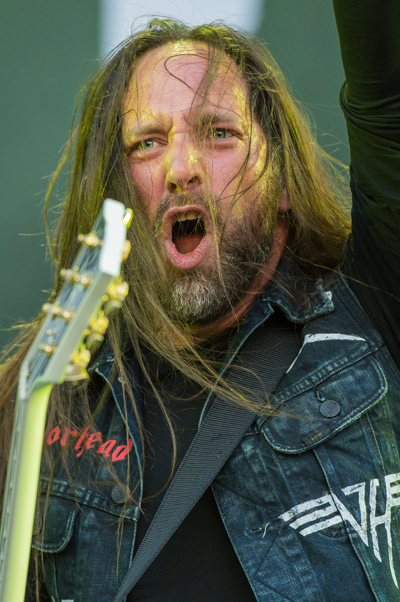 ARGO-Konzerte,Beck's Park Stage,Festival,In Flames,Konzert,Livekonzert,Livemusik,Musik,Niclas Engelin,RiP,Rock im Park 2015